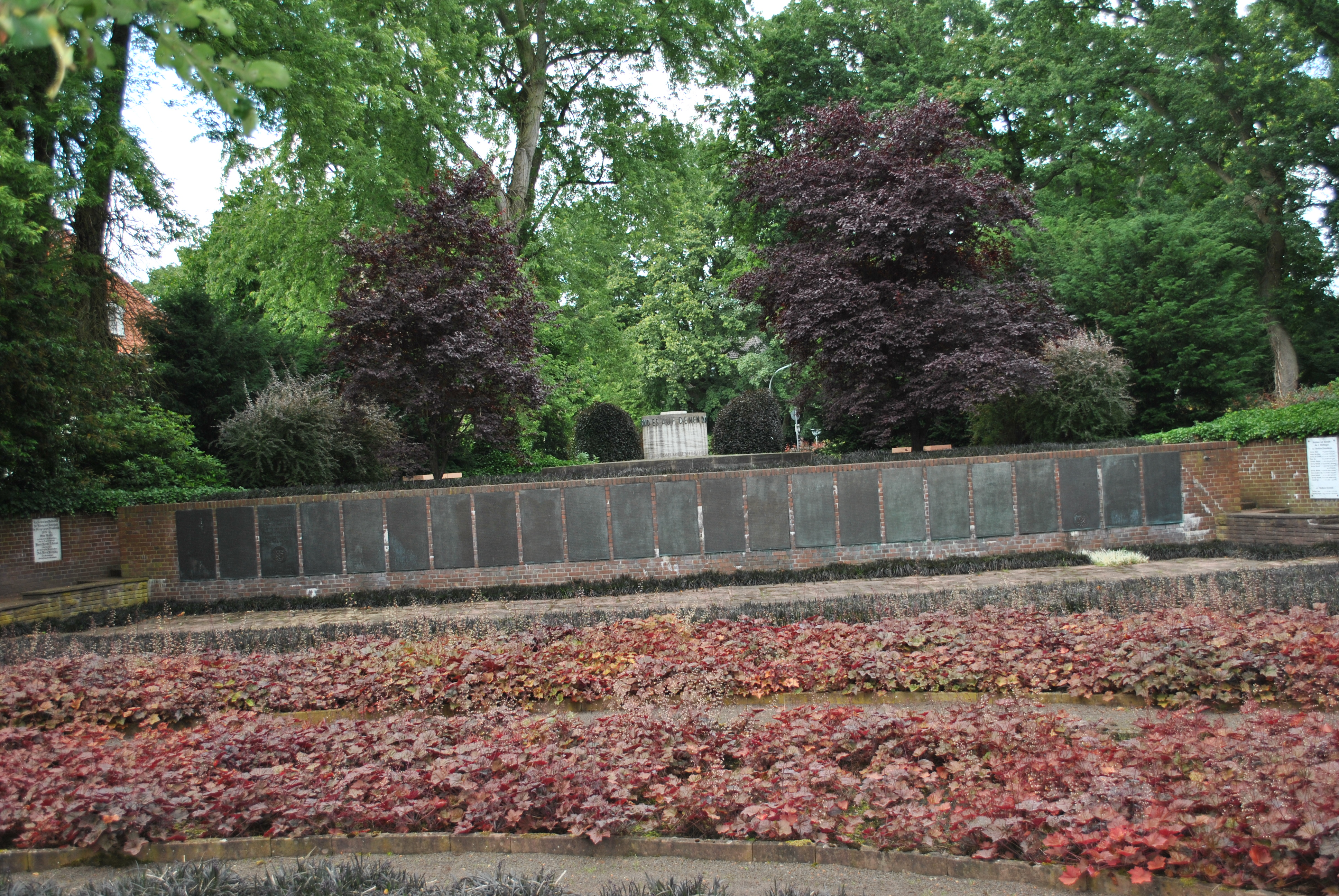 Schwarzer Garten in Nordhorn